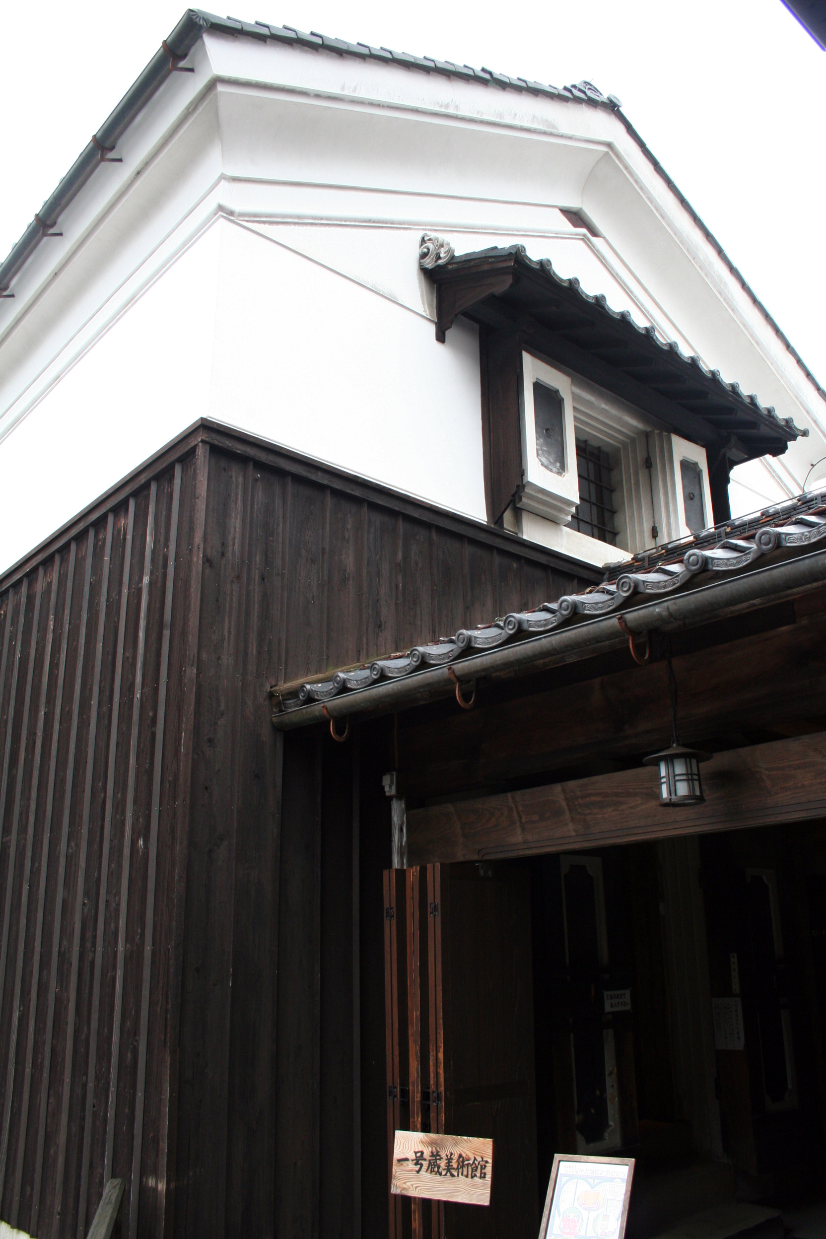 鳥取県八頭郡智頭町にある旧宿場街「智頭宿」。 石谷家の入口付近にある倉。